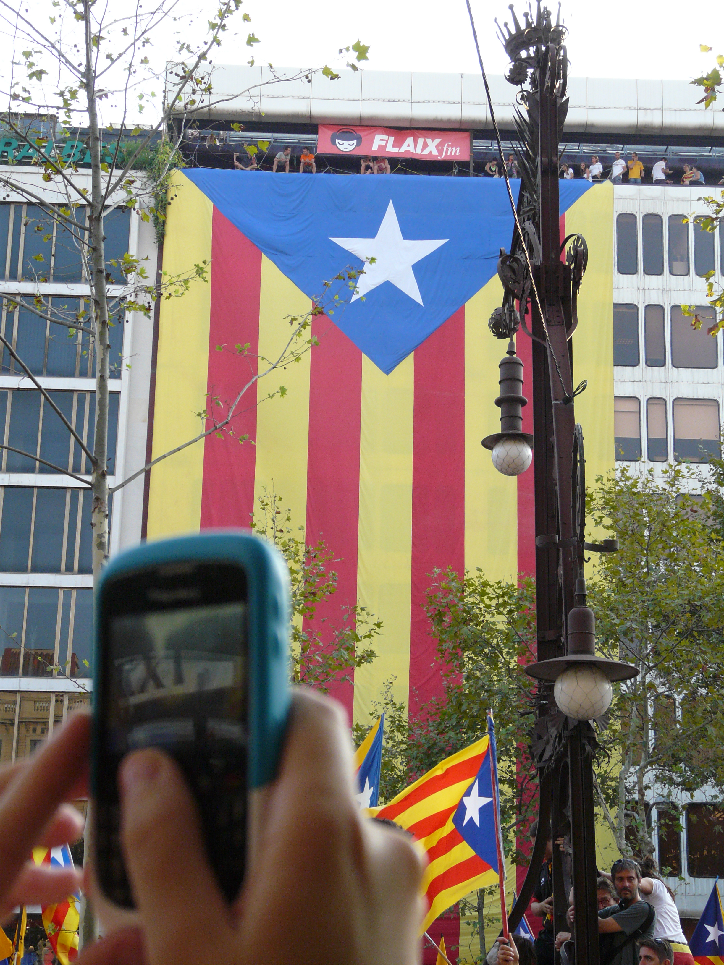 Fanals-Banc (Barcelona) Object location41° 23′ 24.77″ N, 2° 10′ 01.76″ E